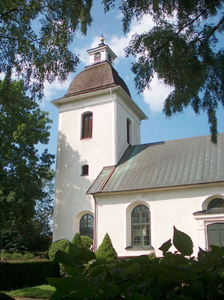 Herrberga kyrka